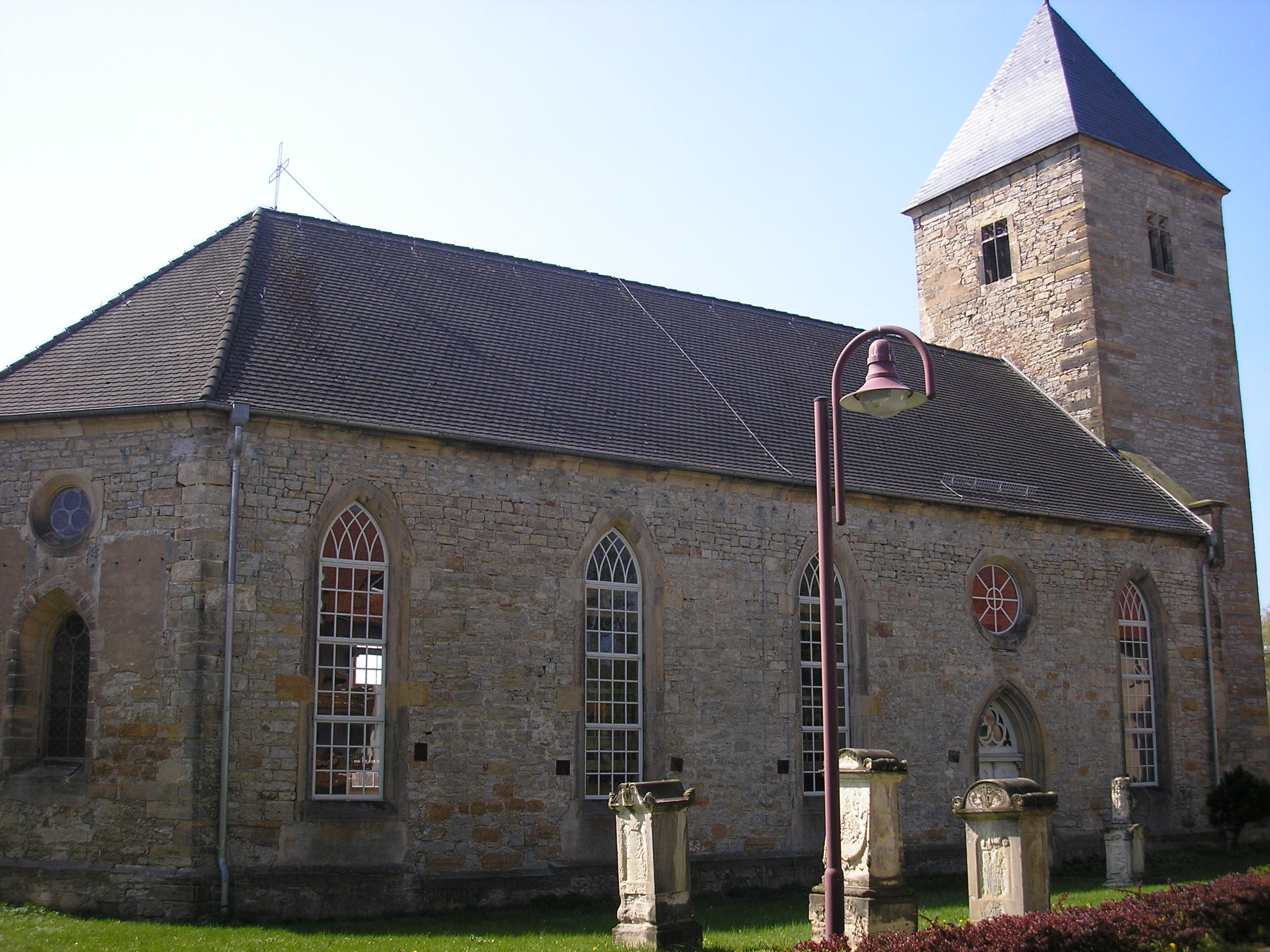 Die Kirche von Alach bei Erfurt.